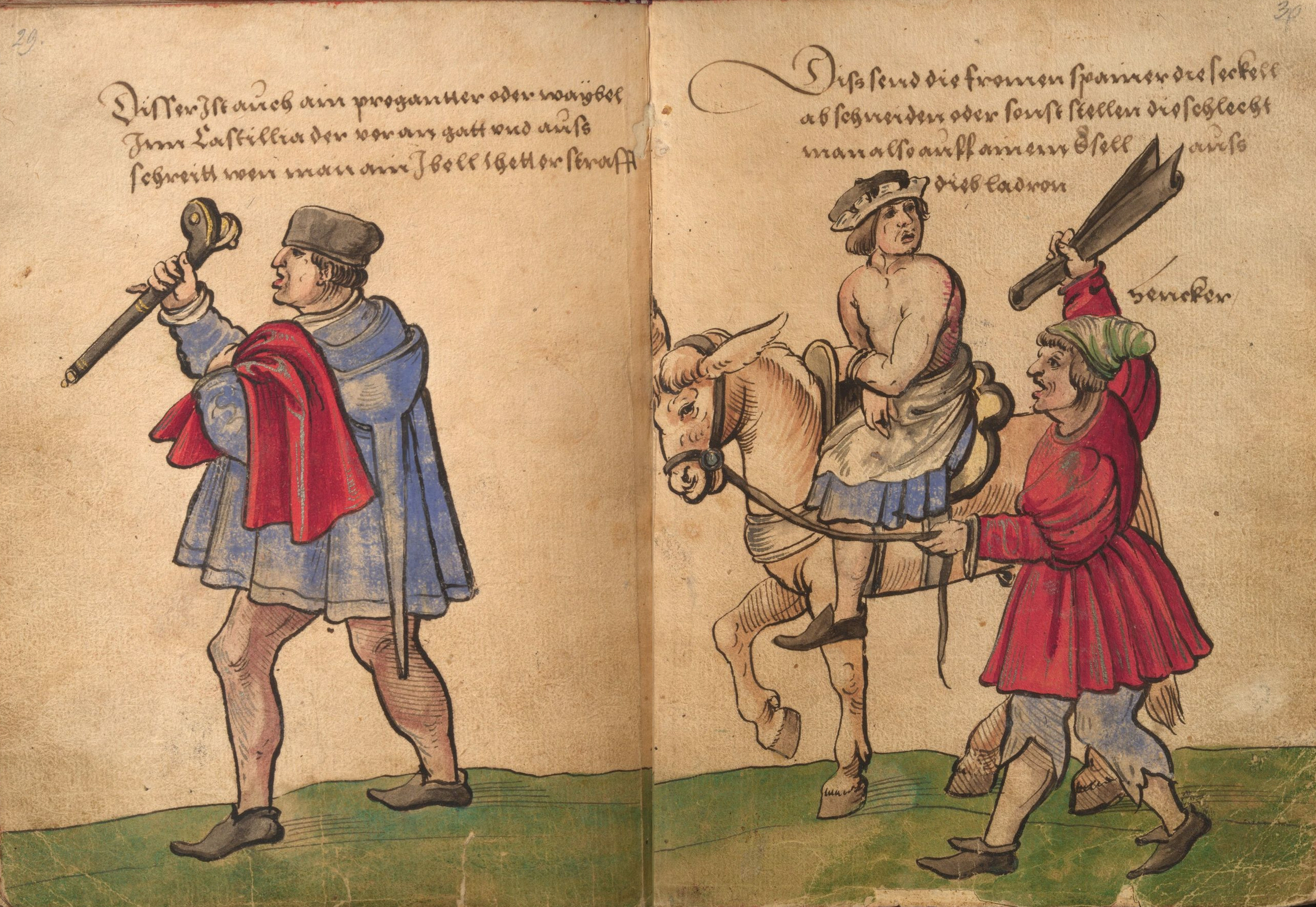 "Trachtenbuch" des Christoph Weiditz, Germanisches Nationalmuseum Nürnberg, Hs. 22474. Bl. 29–30 Kastilianischer Weibel / Bestrafung eines Beutelschneiders in Spanien